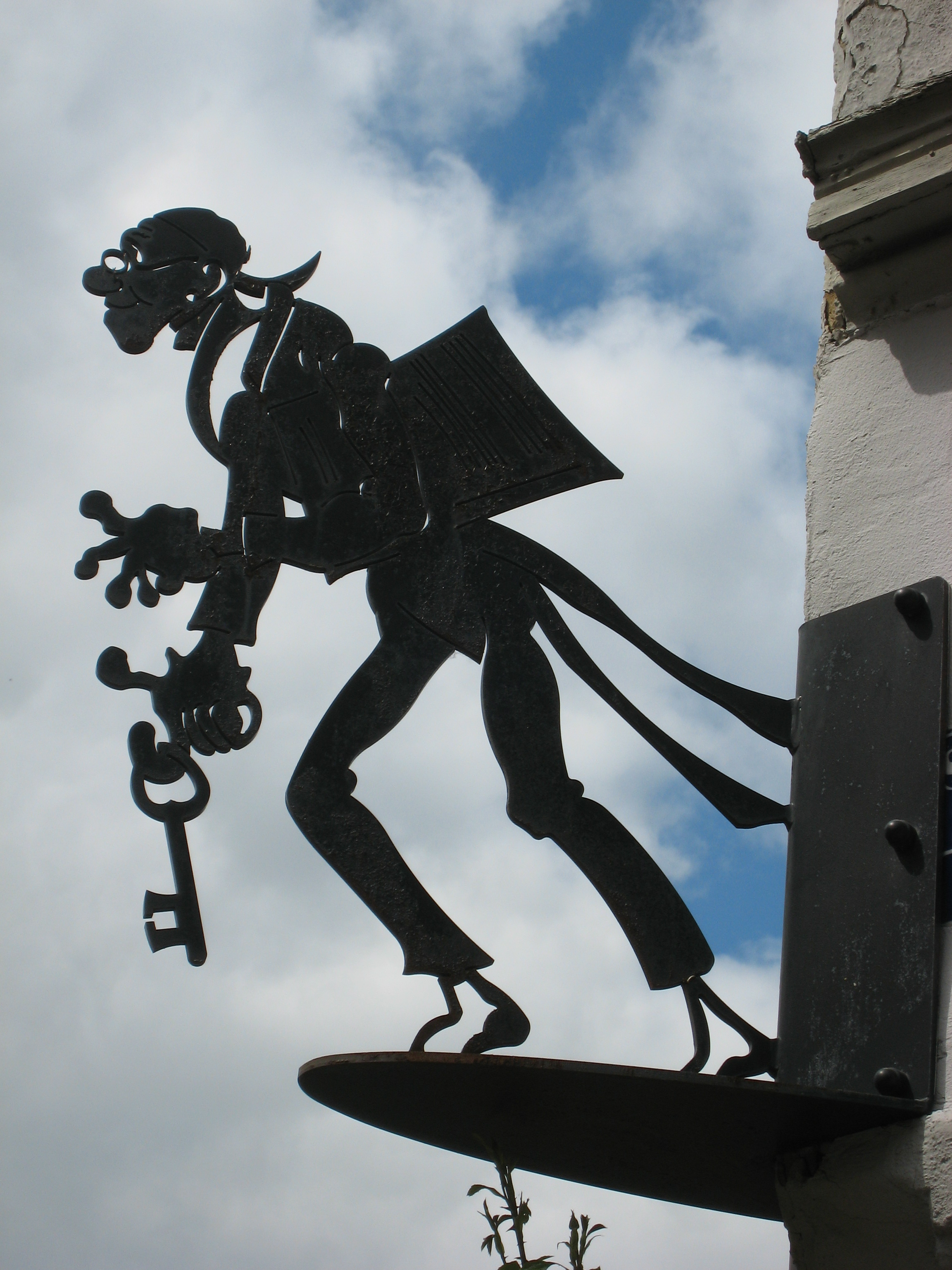 Lehrer Lämpel aus "Max und Moritz" am Haus Schulgasse in Arnstadt.